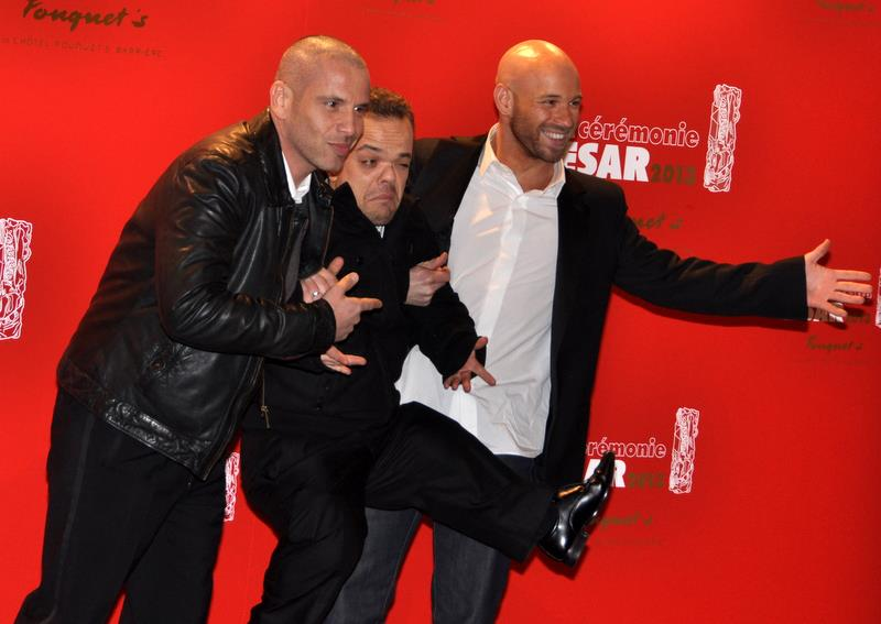 Les "Kaïras" à la cérémonie des César